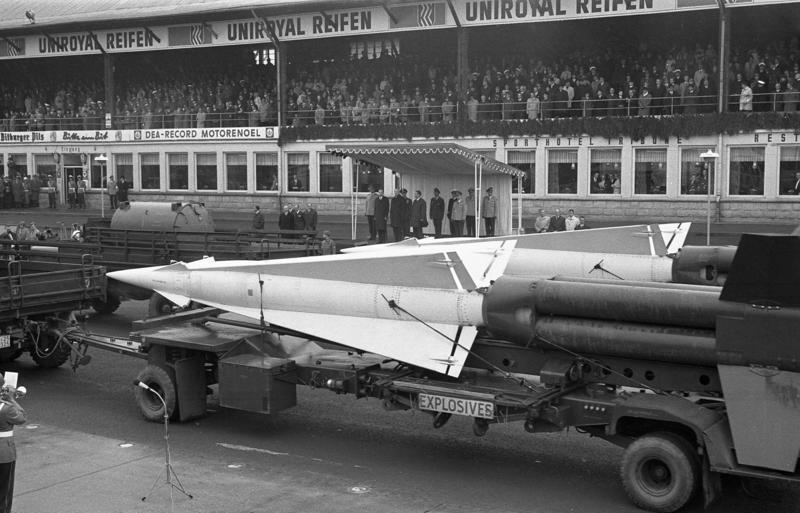 20 Jahre NATO. Bundeswehrparade auf dem Nürburgring.